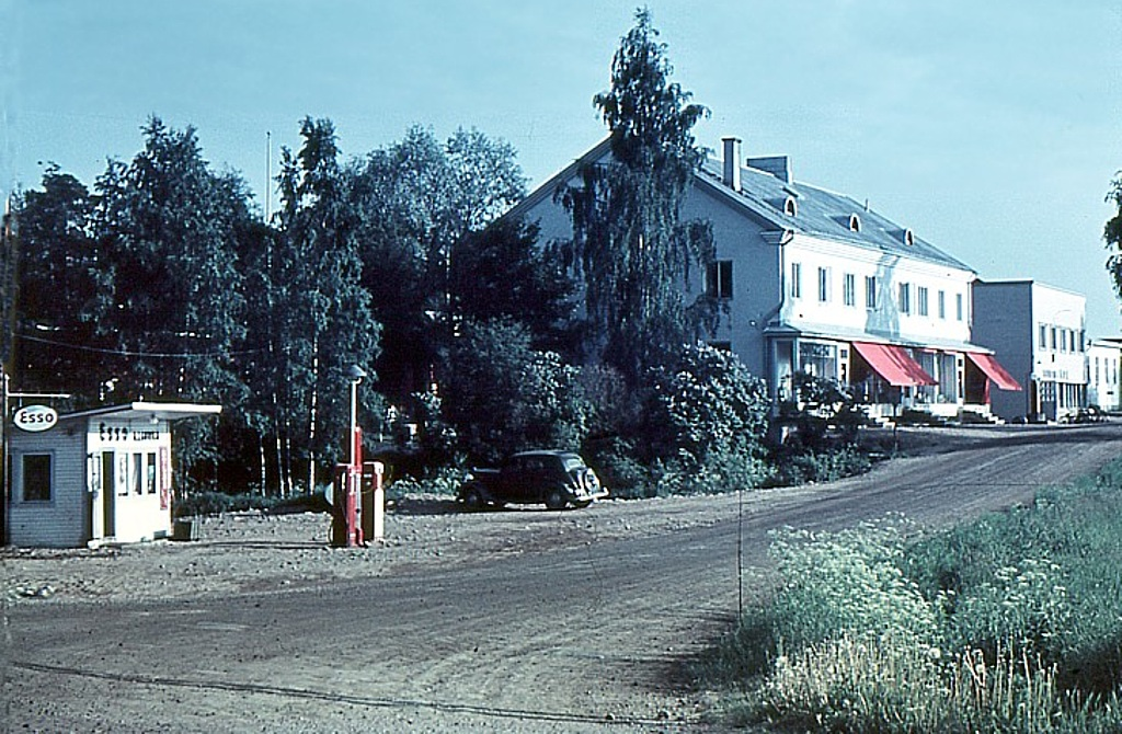 Vasemmalla A. Laurilan kioskimallinen huoltoasema Urjalan asemankylällä vuonna 1956.